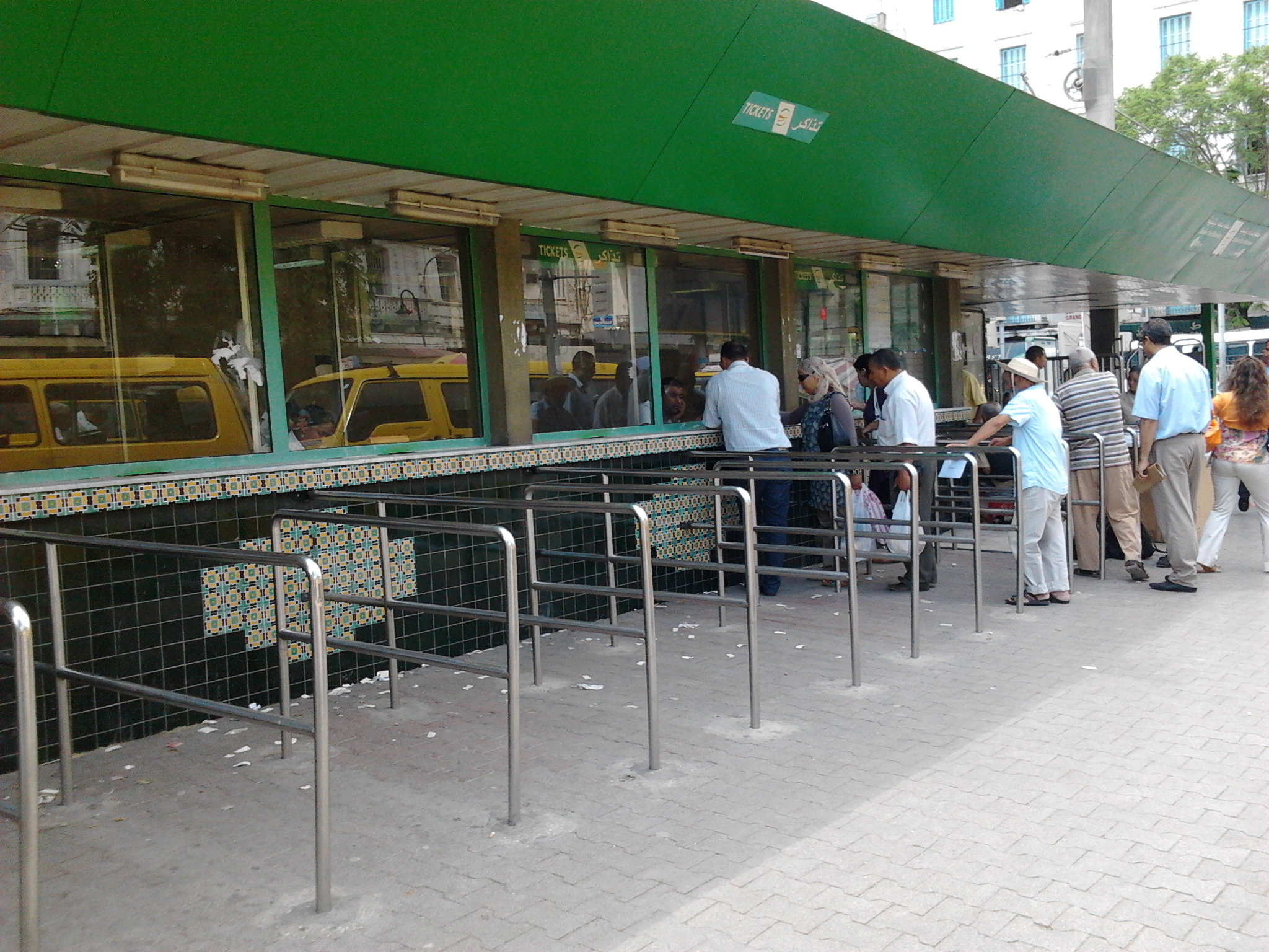 Place Barcelone - Tunis - guichets - Métro